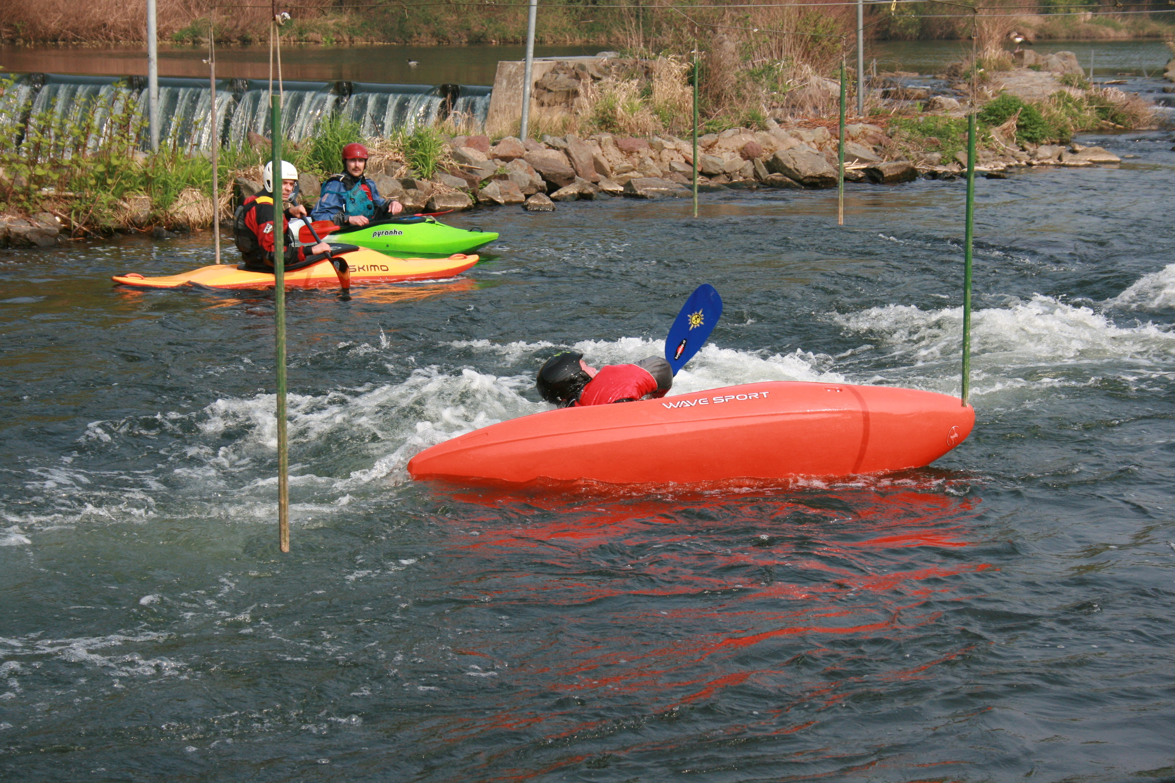 Wildwasserpark an der Lenne in Hagen-Hohenlimburg